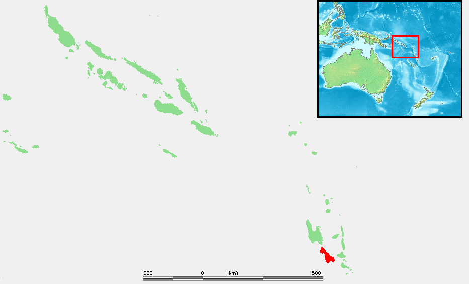 Island of Vanuatu - Malakula.PNG